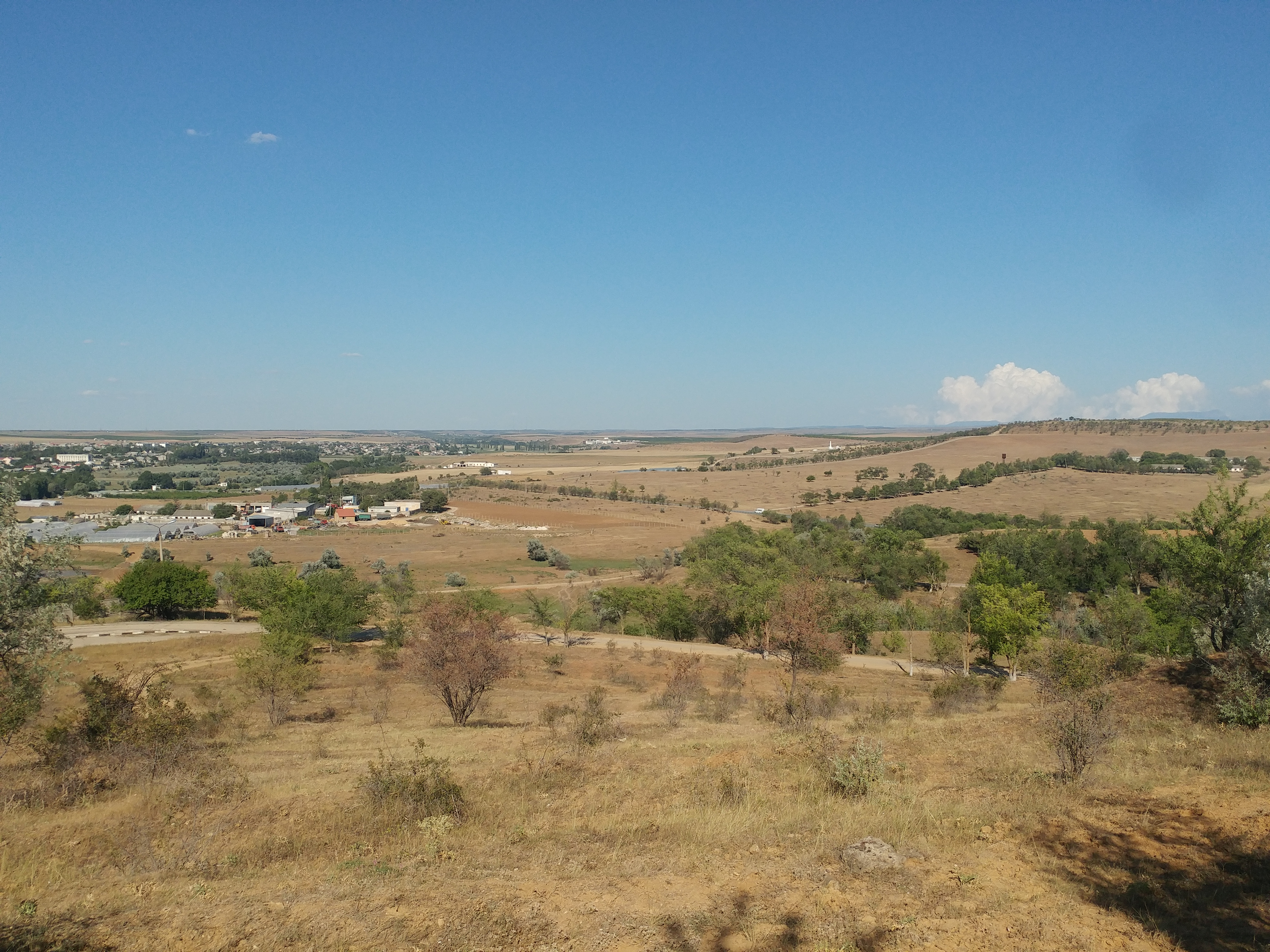 Левый берег реки Альма. Вид с Телеграфного холма на Курганную высоту, севастопольскую дорогу и село Вилино (Бурлюк).